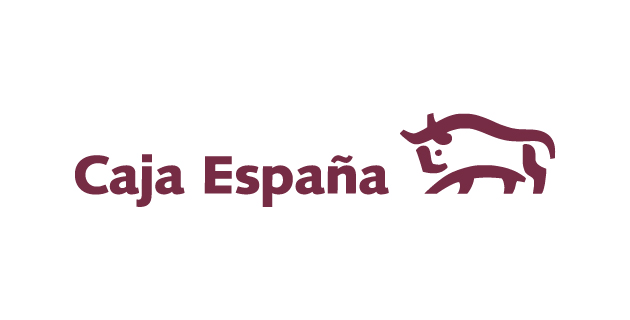 Logo Caja España